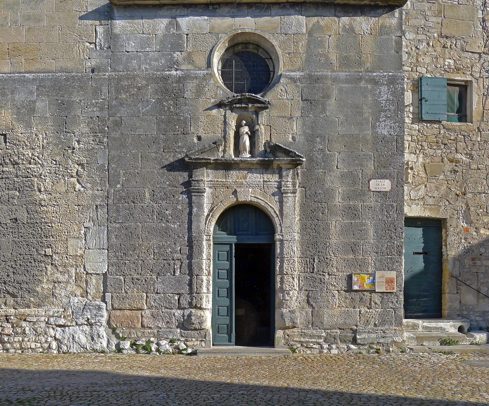 Église Notre-Dame-de-la-Major (portail annexe) - Arles (Bouches-du-Rhône)